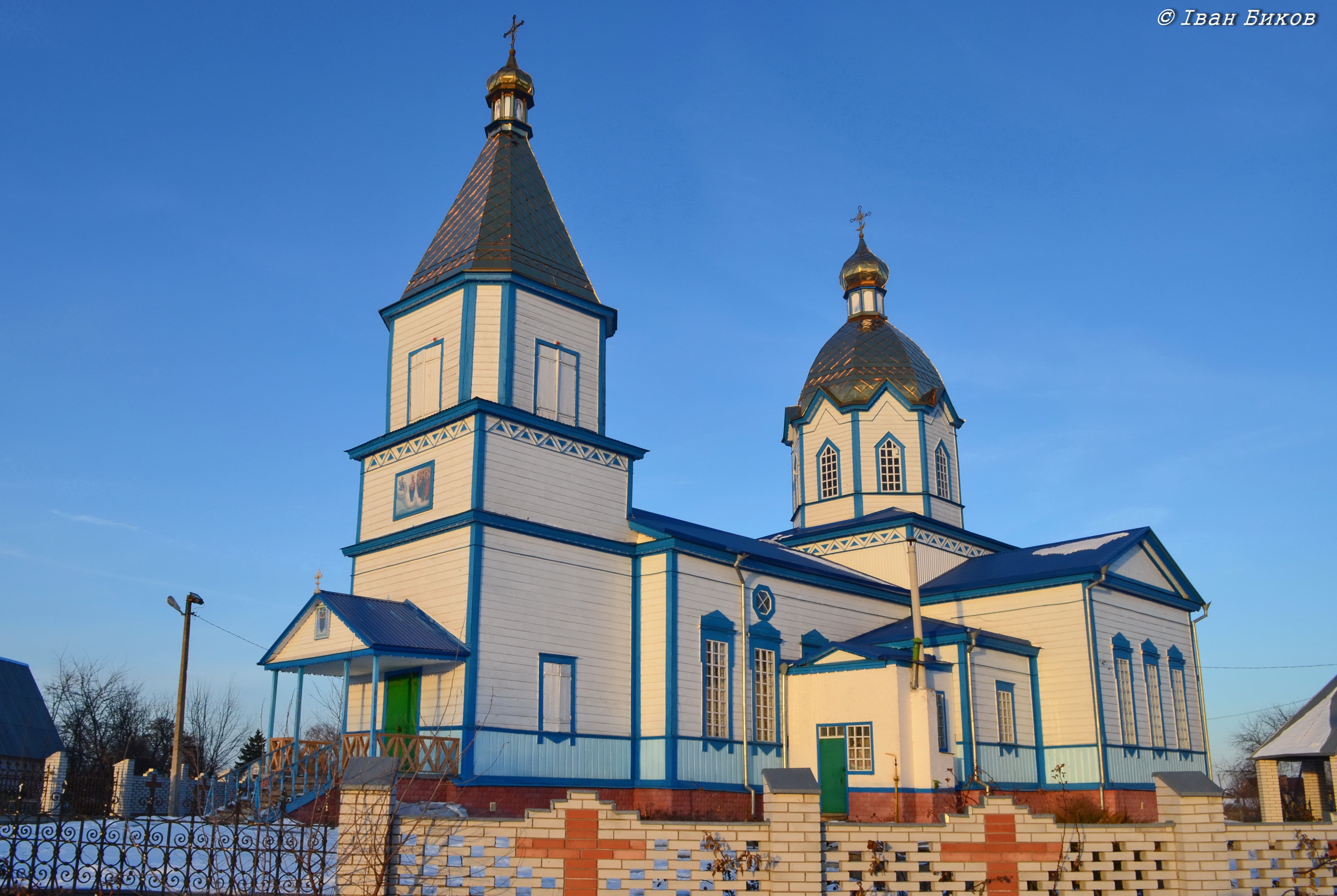 Велика Димерка. Дерев'яна Покровська церква. 1888 р.